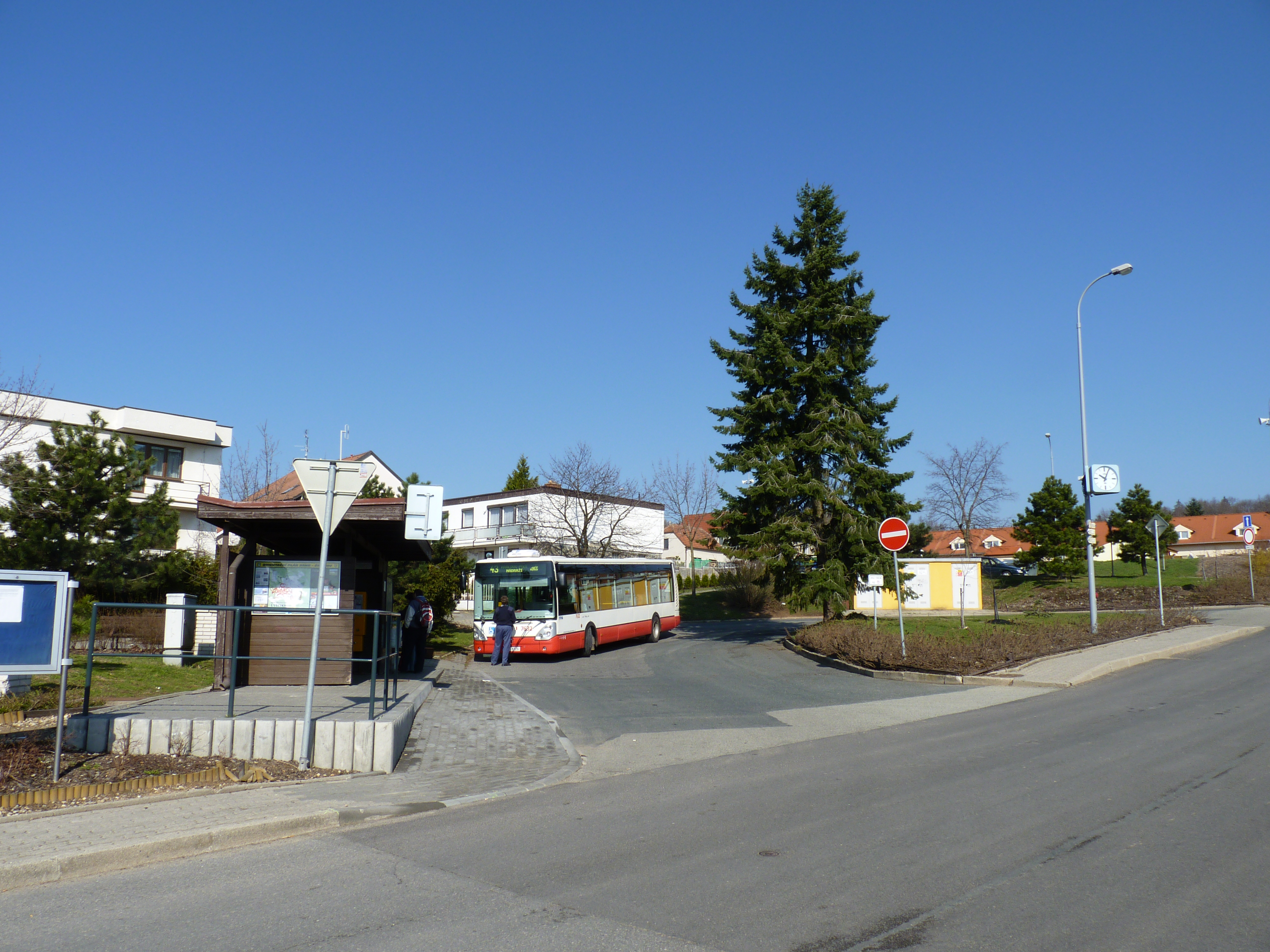 Autobusová točna. Brno-Útěchov